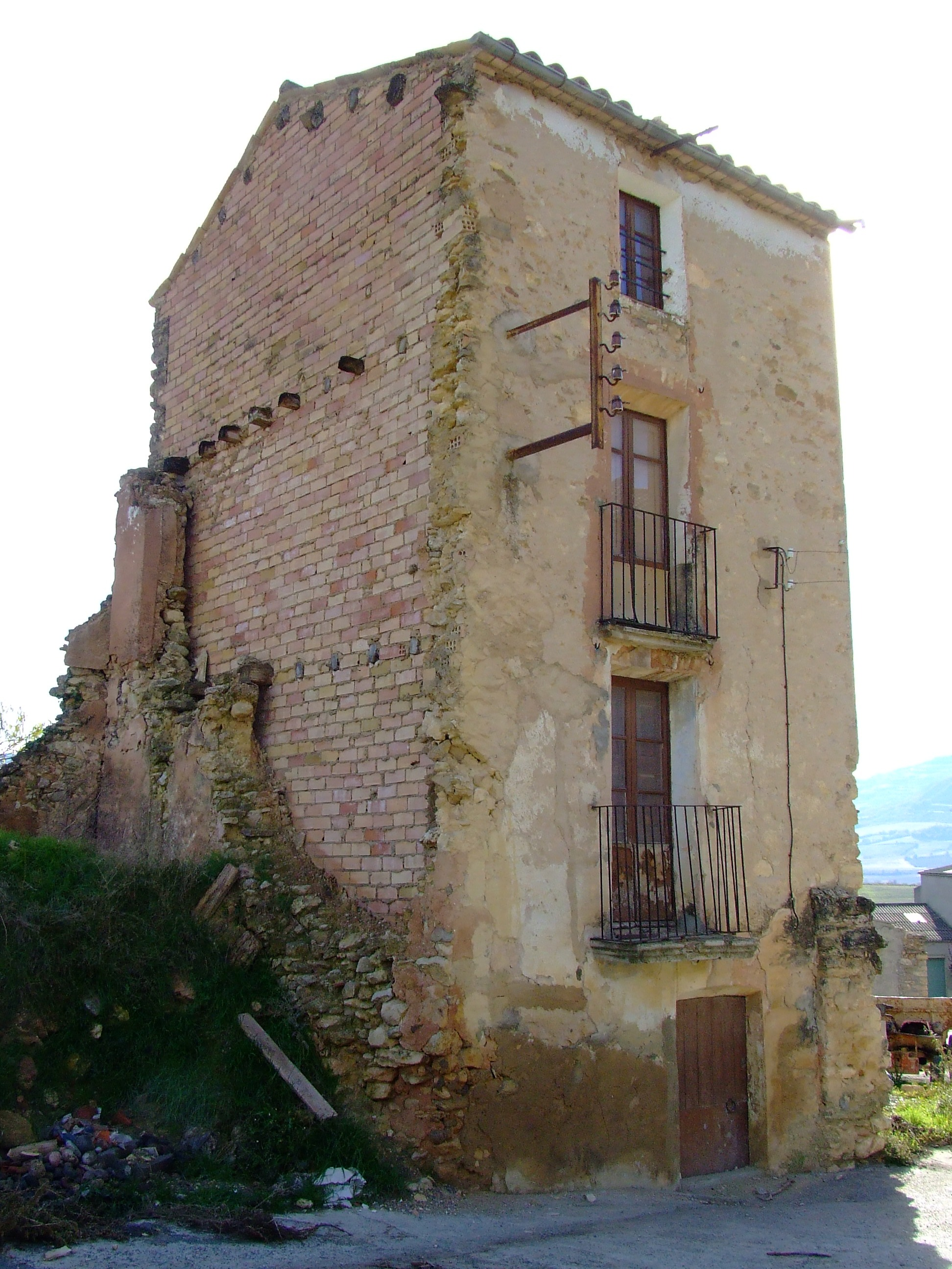 Casa supervivent dels bombardeigs del 1938 (Conques, Isona i Conca Dellà, Pallars Jussà)